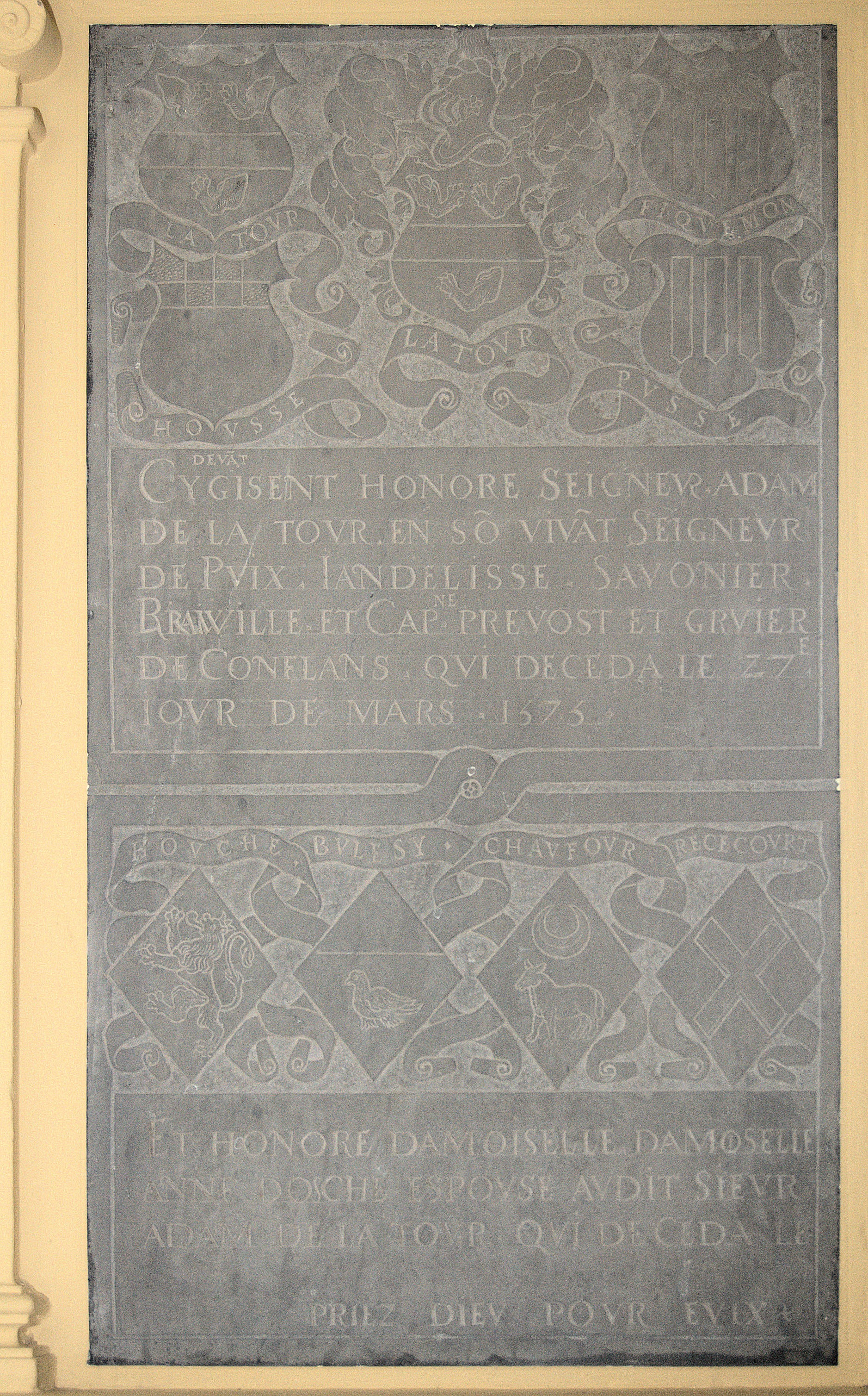 Plaque funéraine d'Adam de La Tour, capitaine prévôt et gruyer de Conflans, et d'Anne Dosche, située dans le choeur de l'église de Puxe. Armoiries de Ficquelmont, de Récicourt.